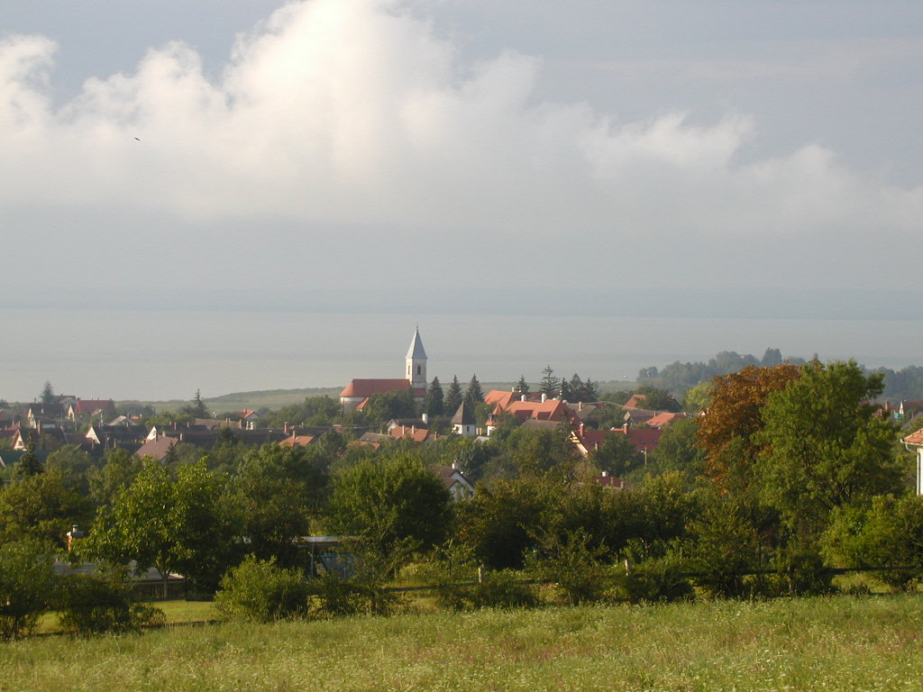 Paloznak látképe